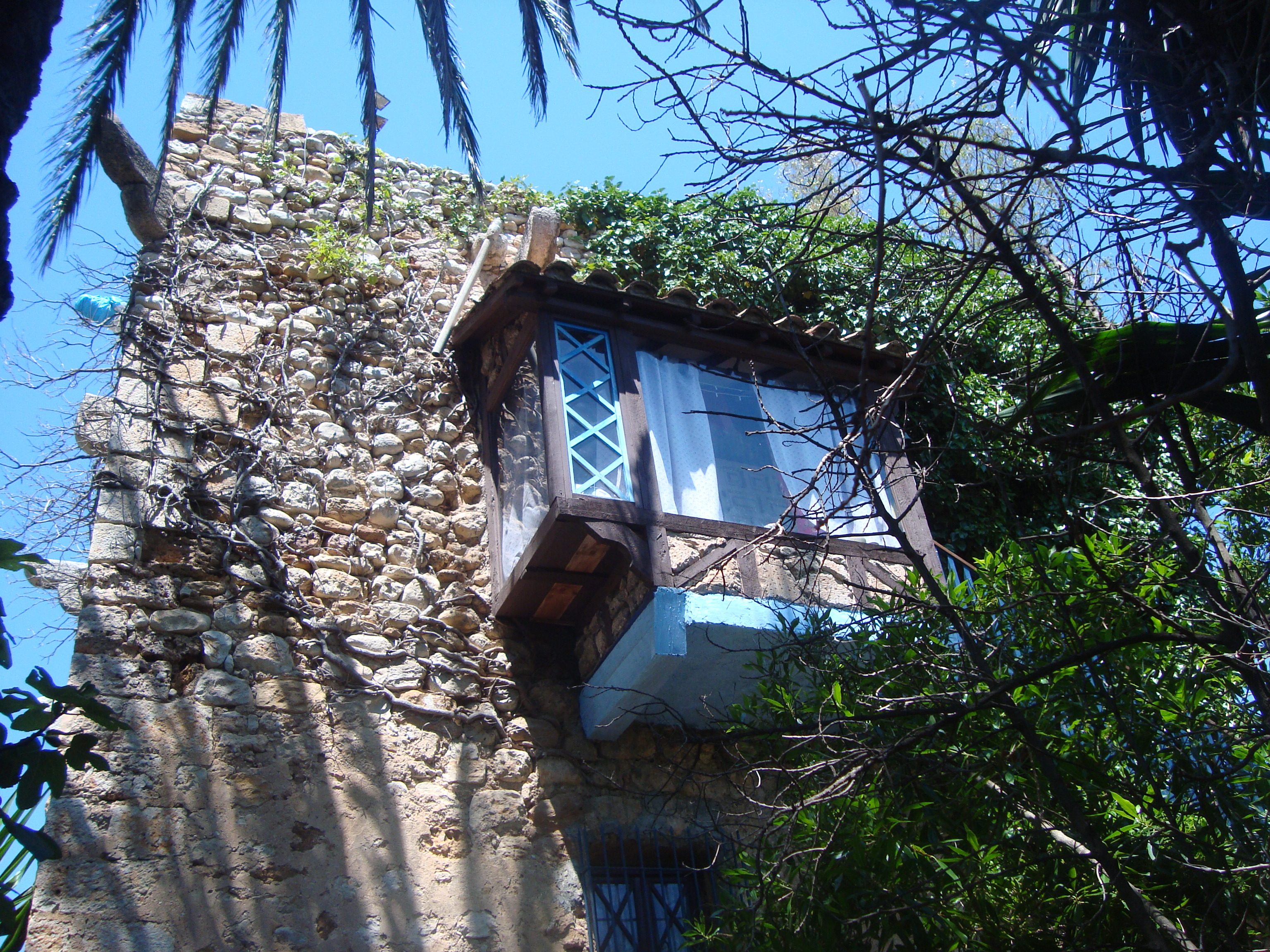 Torre vigia de Capicorb (Alcalá de Xivert)